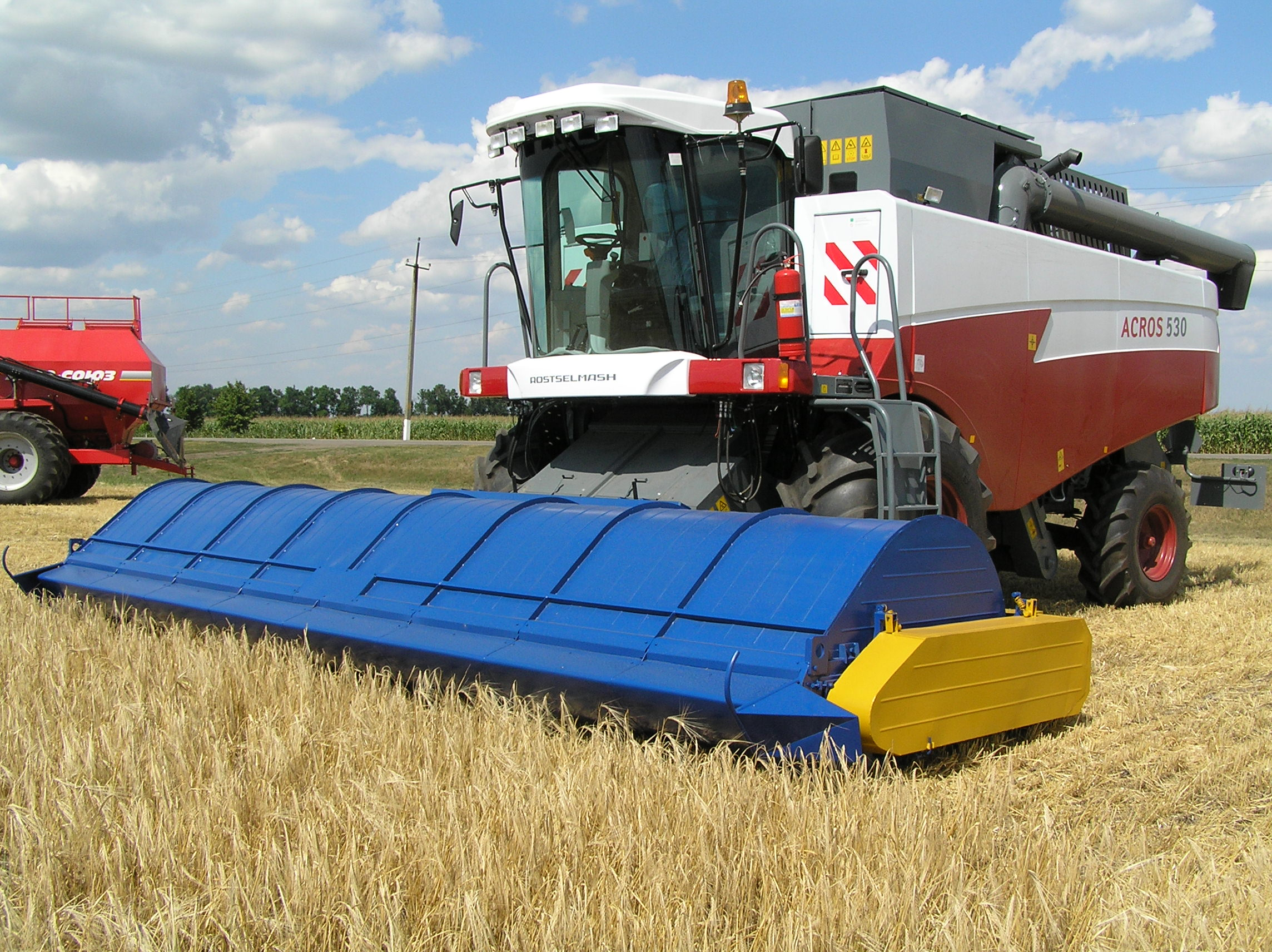 Жатка двухбарабанная очёсывающего типа "Славянка УАС"